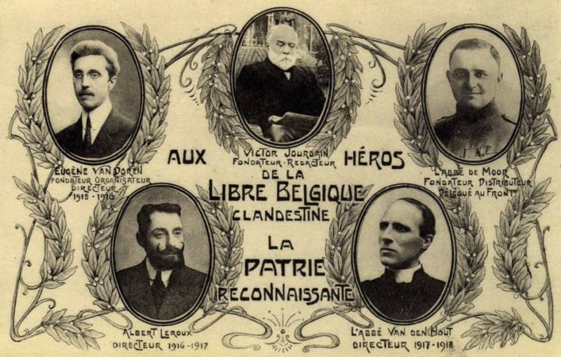 Carte postale WWI - Fondateurs et directeurs de la Libre Belgique clandestine (1915-1918)